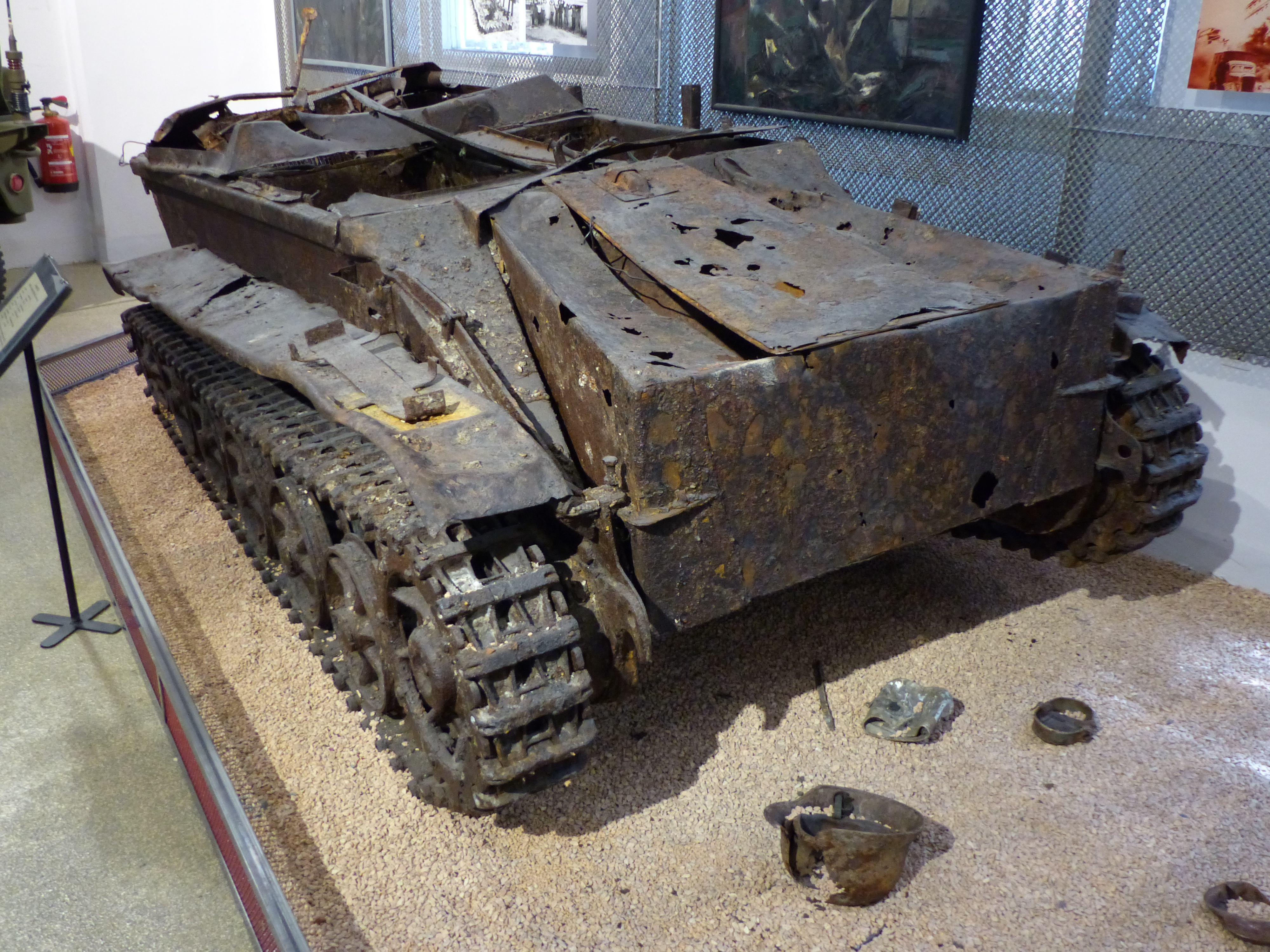 Borgward IV - Ausführung C (Sd.Kfz 301) im Heeresgeschichtlichen Museum Wien - 2010 bei Erdarbeiten auf dem Gelände des Wiener Südbahnhofes gefunden